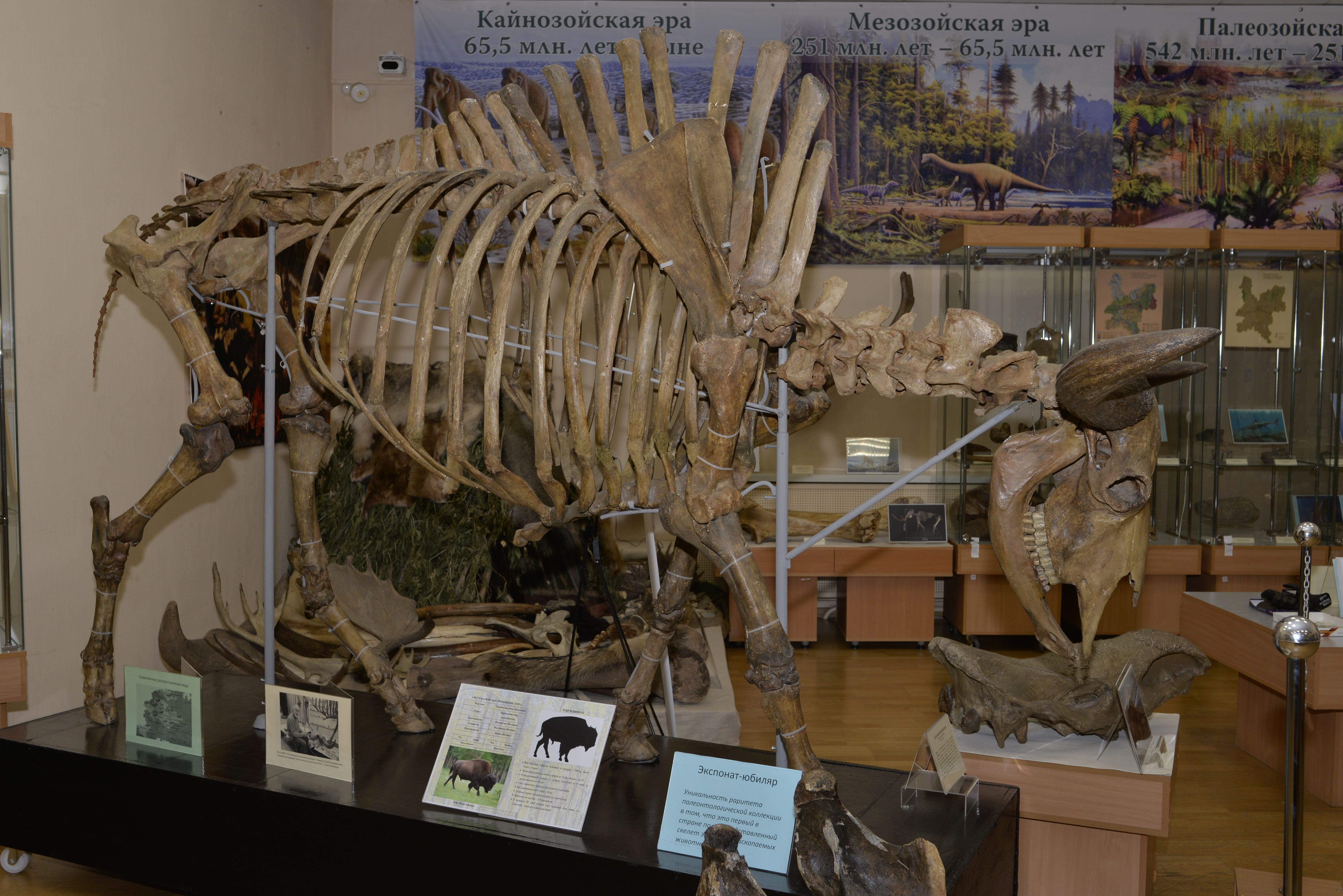 Скелет короткорогого бизона, г. Киров